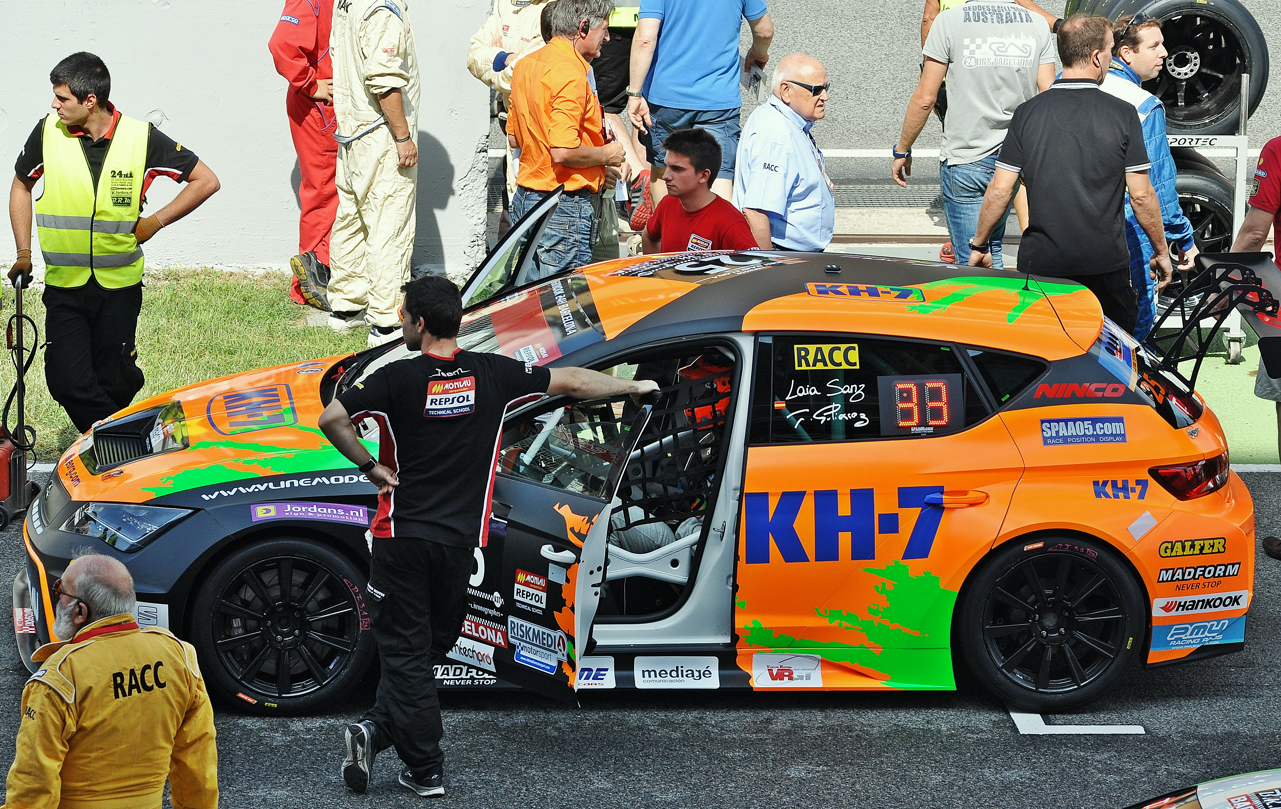 24 horas de Barcelona-circuito de Cataluña